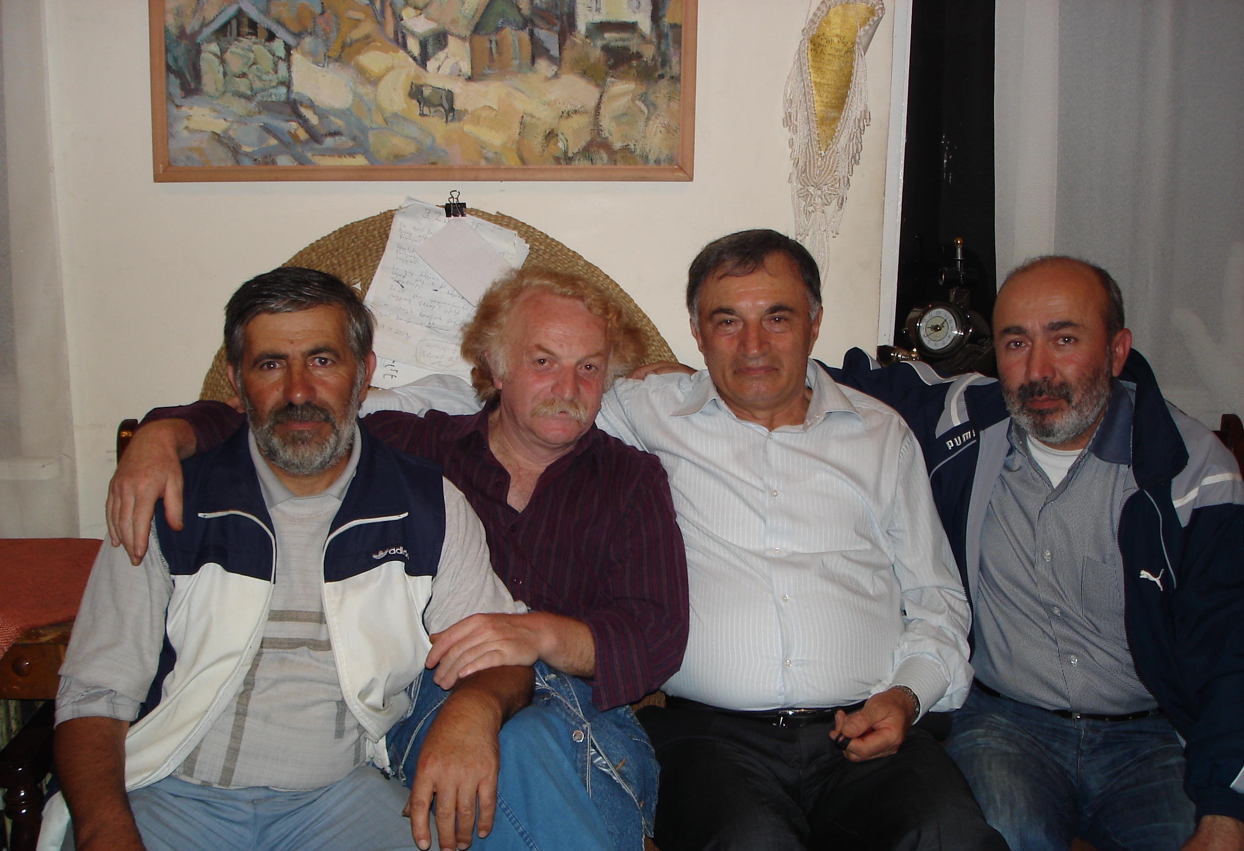 ԱԼՓԱ ԵՎ ԸՆԿԵՐՆԵՐ